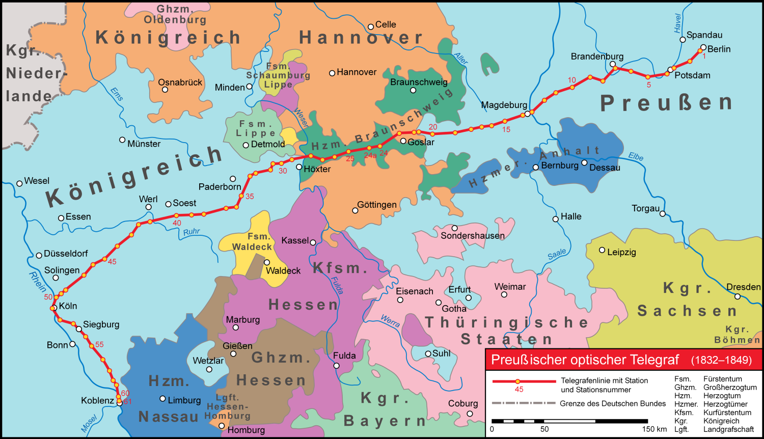 Verlauf des Preußischen optischen Telegrafs um 1835